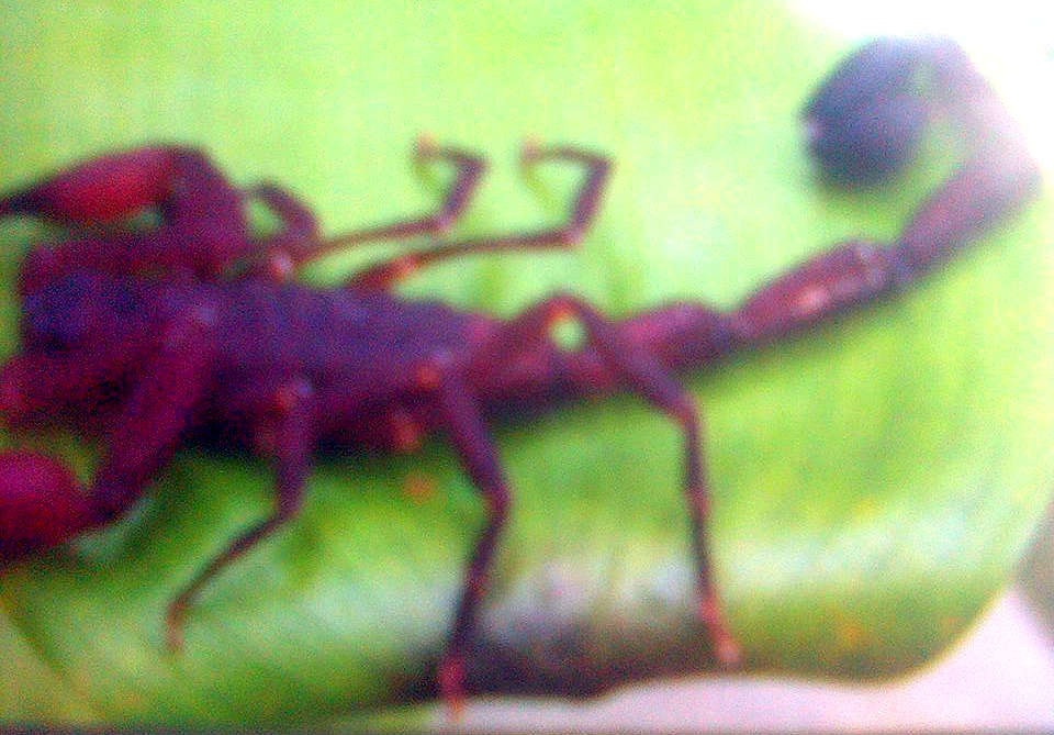 Escorpión de la Sierra Nevada de Santa Marta, Colombia.